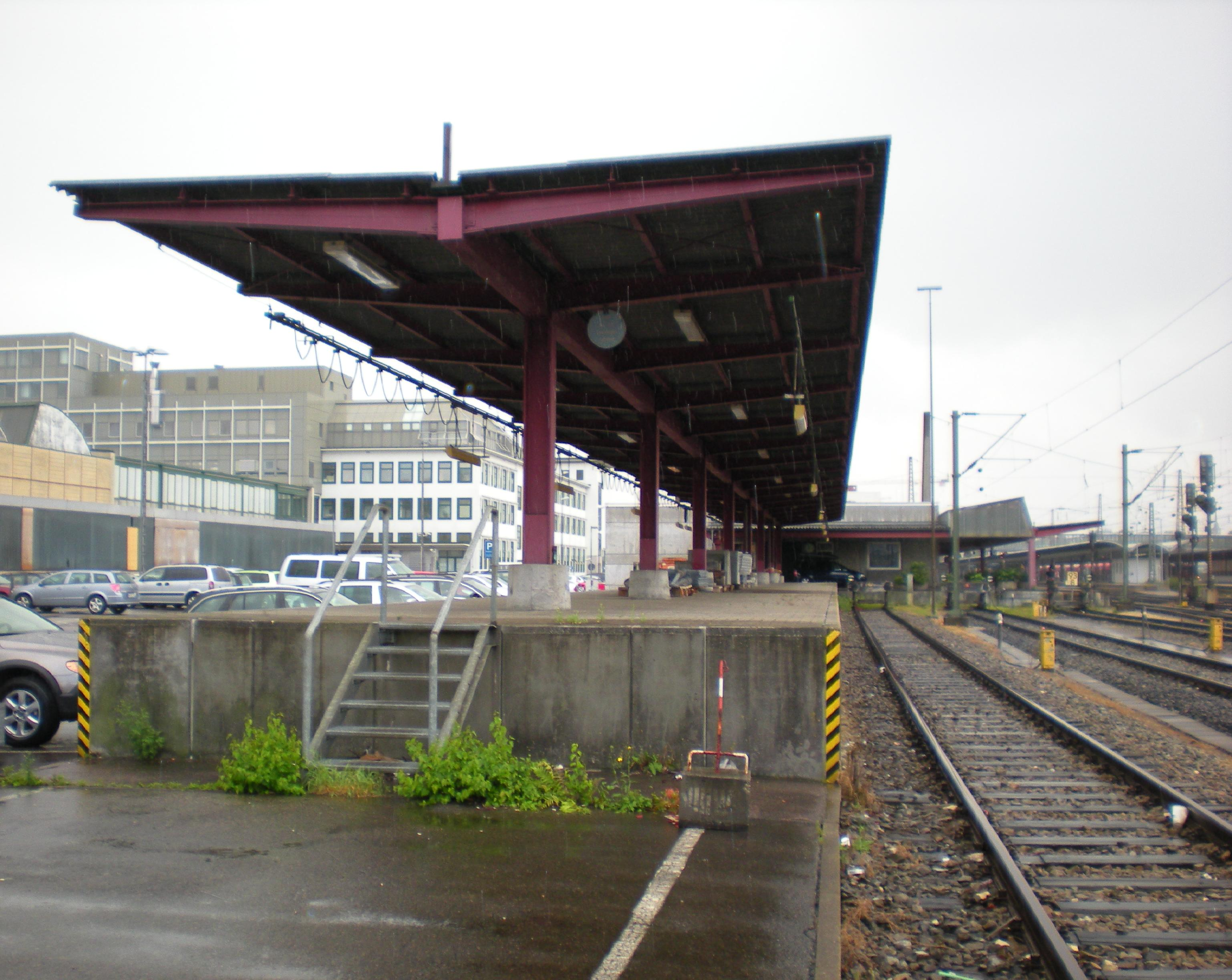 Ehemalige Laderampe der Güterabfertigung am Ulmer Hauptbahnhof